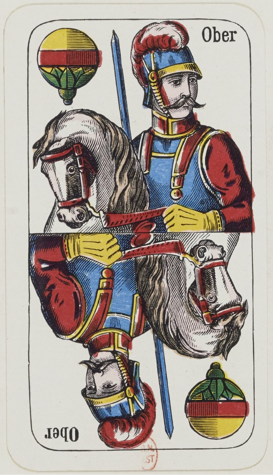 Wyżnik dzwonkowy z wzoru wuntemburskiego